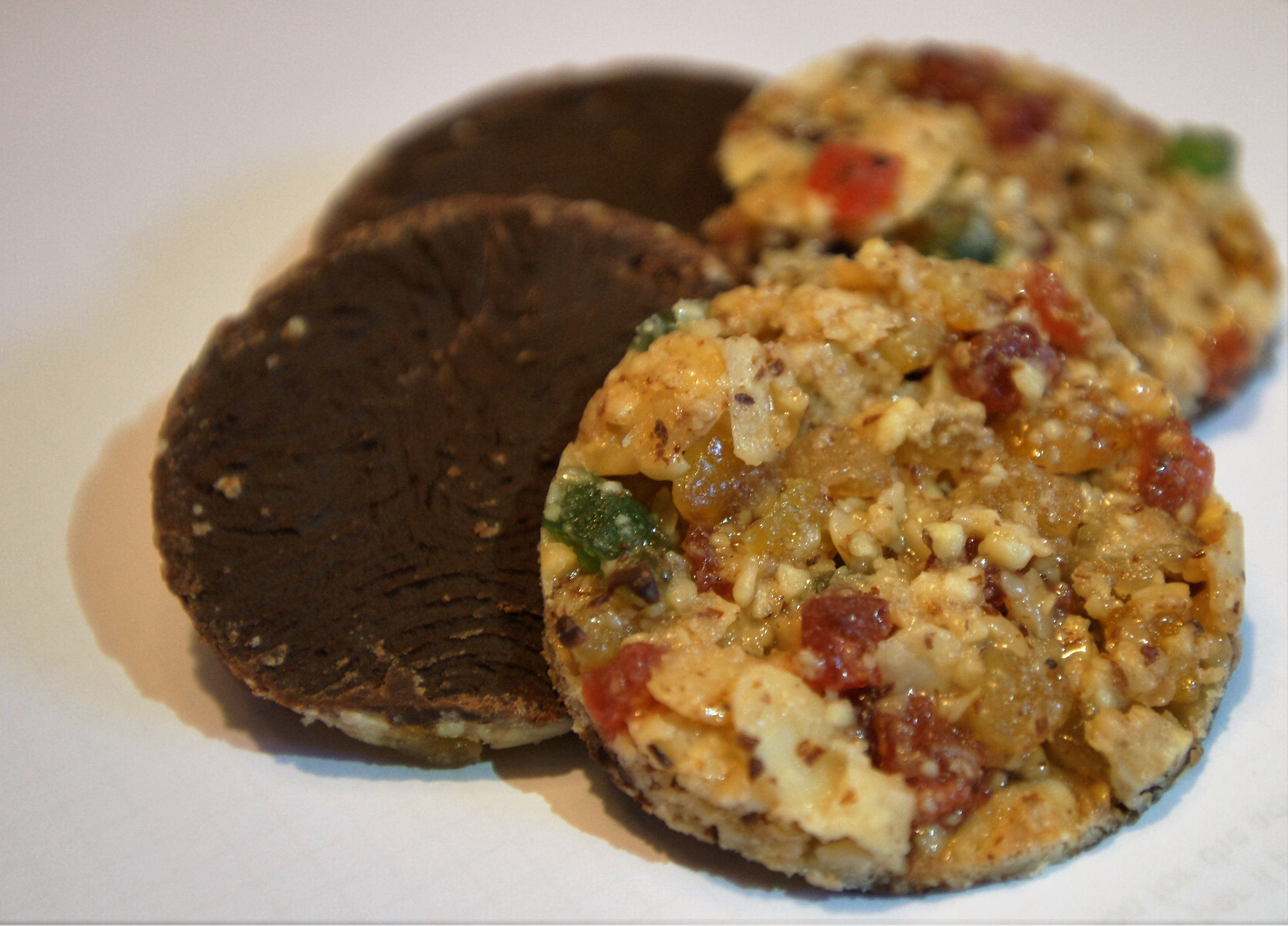 Des florentins - biscuits aux amandes, chocolat et fruits confits